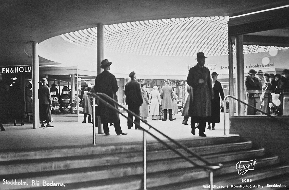 Kupolen i Blå bodarna, Slussen, Stockholm